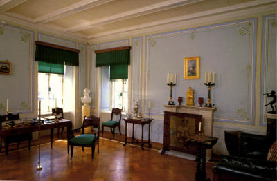 Кабинет Николая I. Ольгин павильон